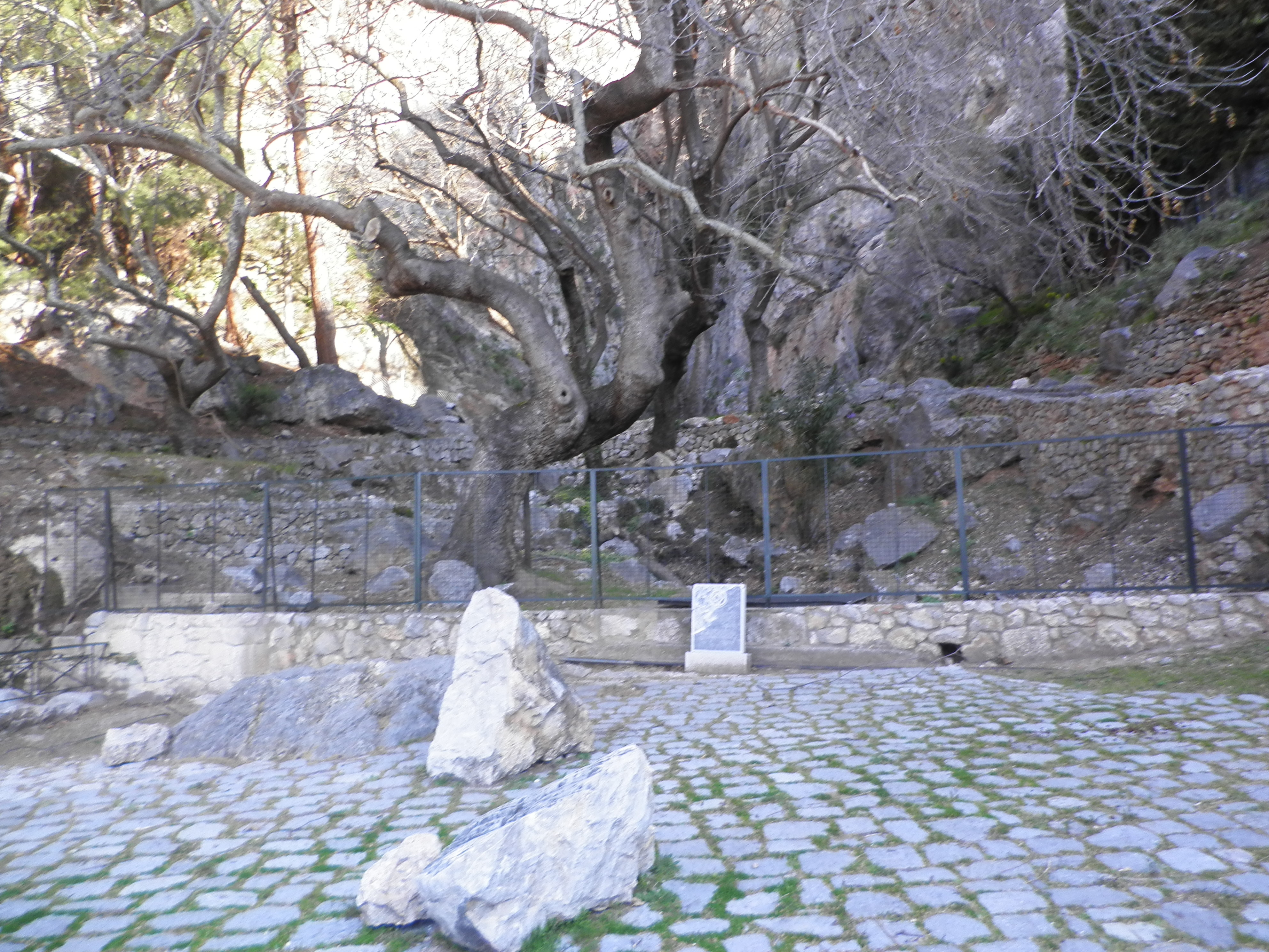 Fontaine de Castalie, à Delphes (Grèce)